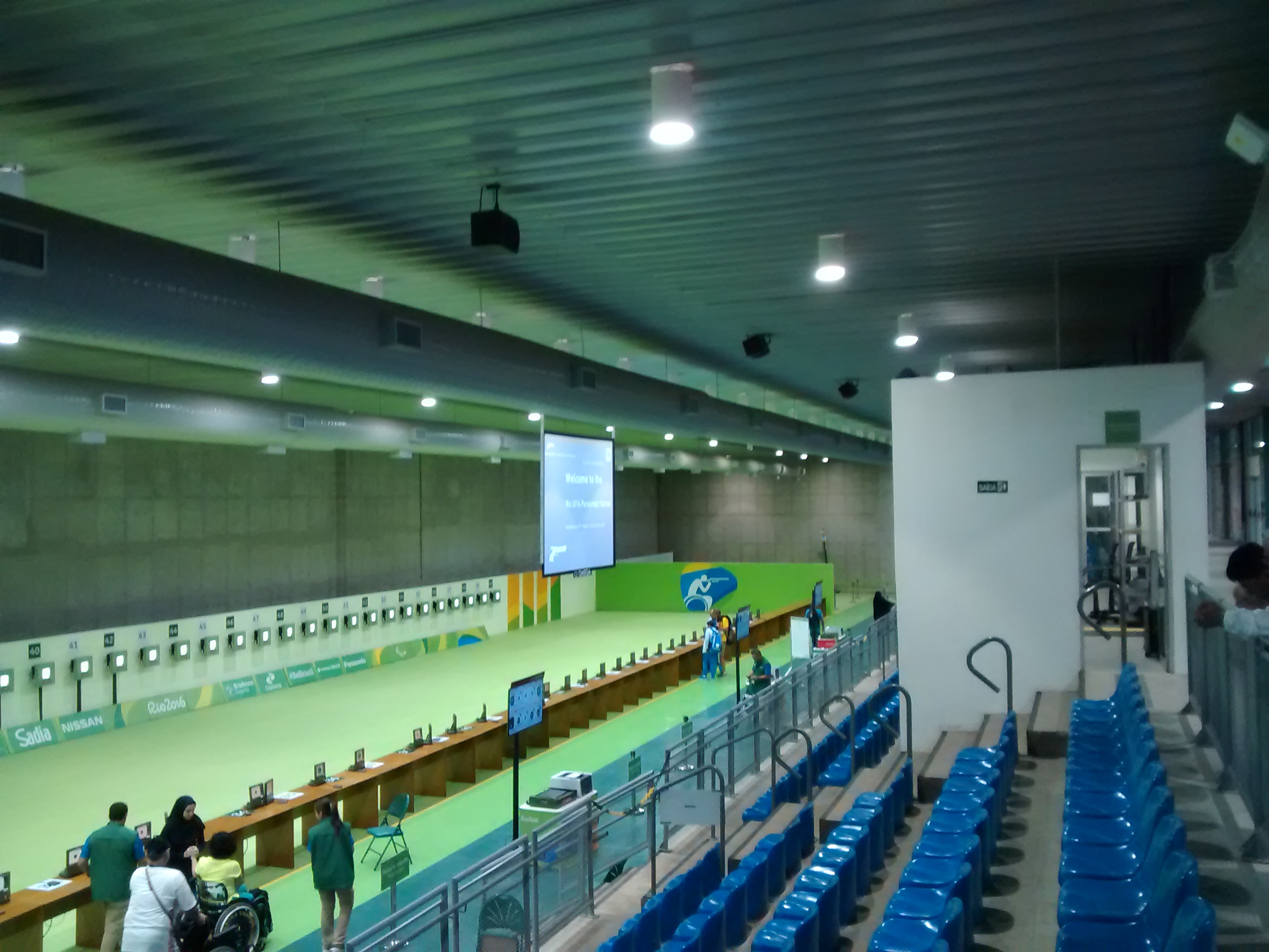 A imagem mostra o stand de tiro onde os atletas buscavam qualificação para as finais do tiro esportivo.